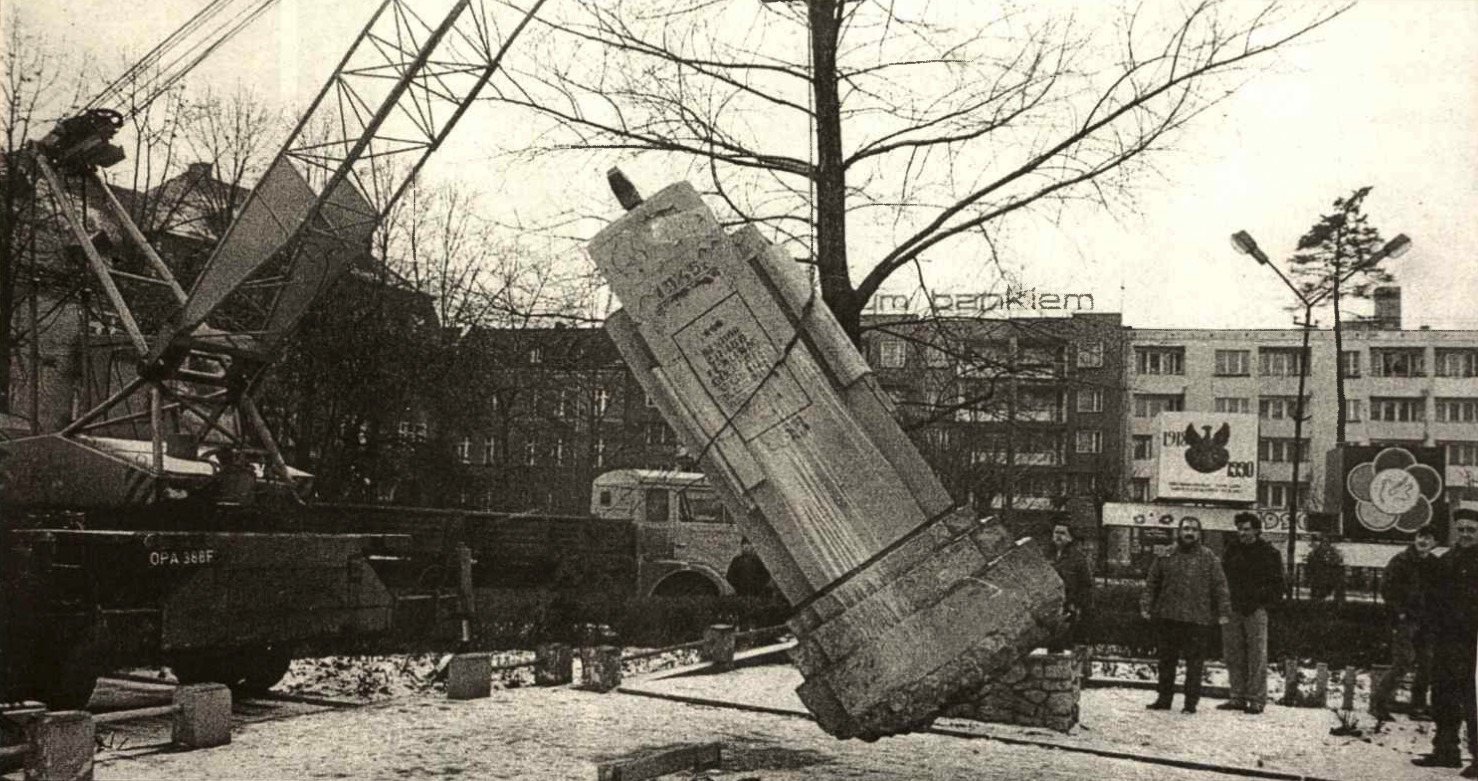 Wyrwanie z ziemi pomnika Armii Czerwonej w Prudniku.